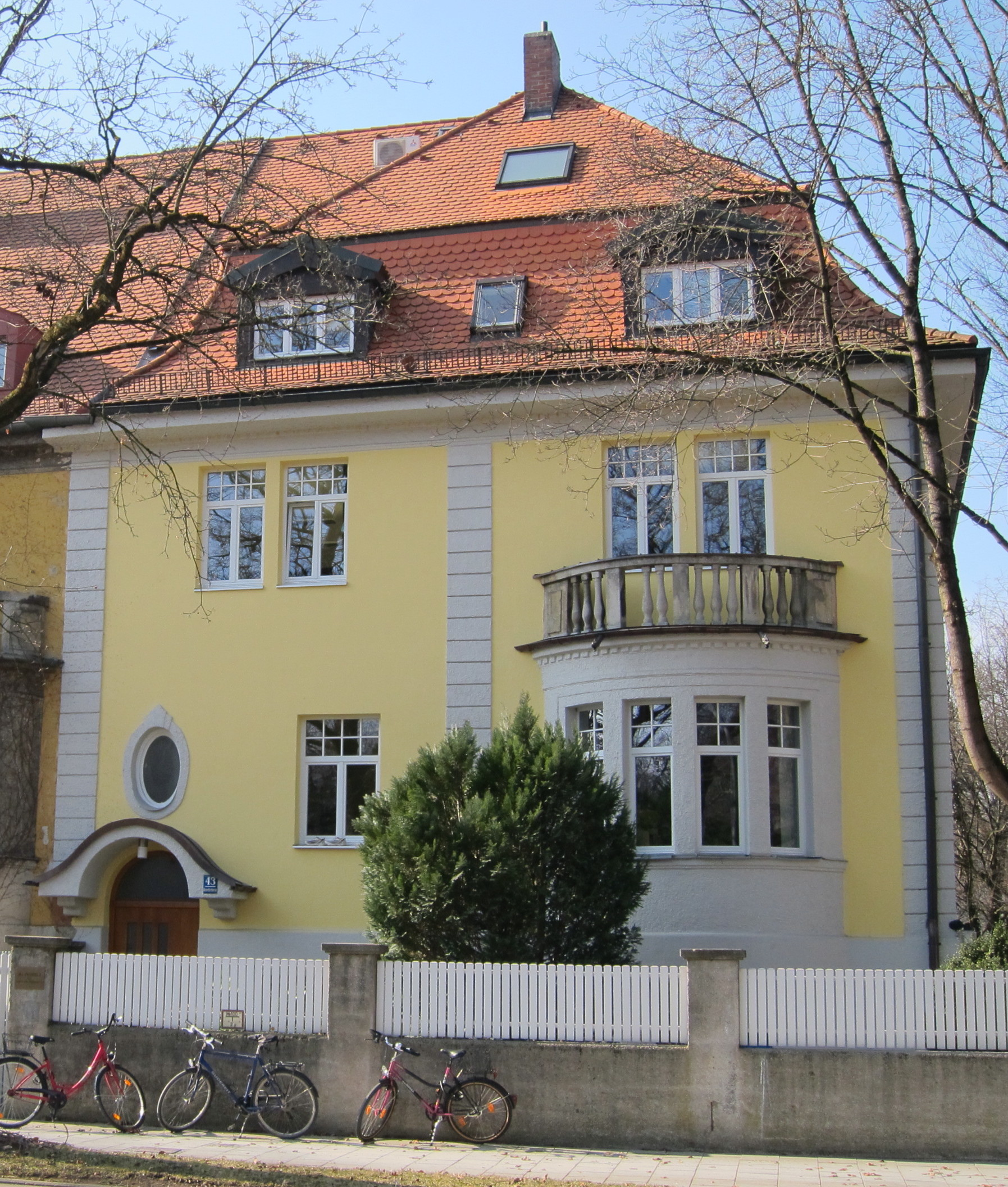 Mauerkircherstraße 43; Villa, barockisierend, 1911 von Heilmann & Littmann erbaut; Wohnhaus von Bruno Walter; mit Nr. 39 und 41 zu einem Block zusammengeschlossen.